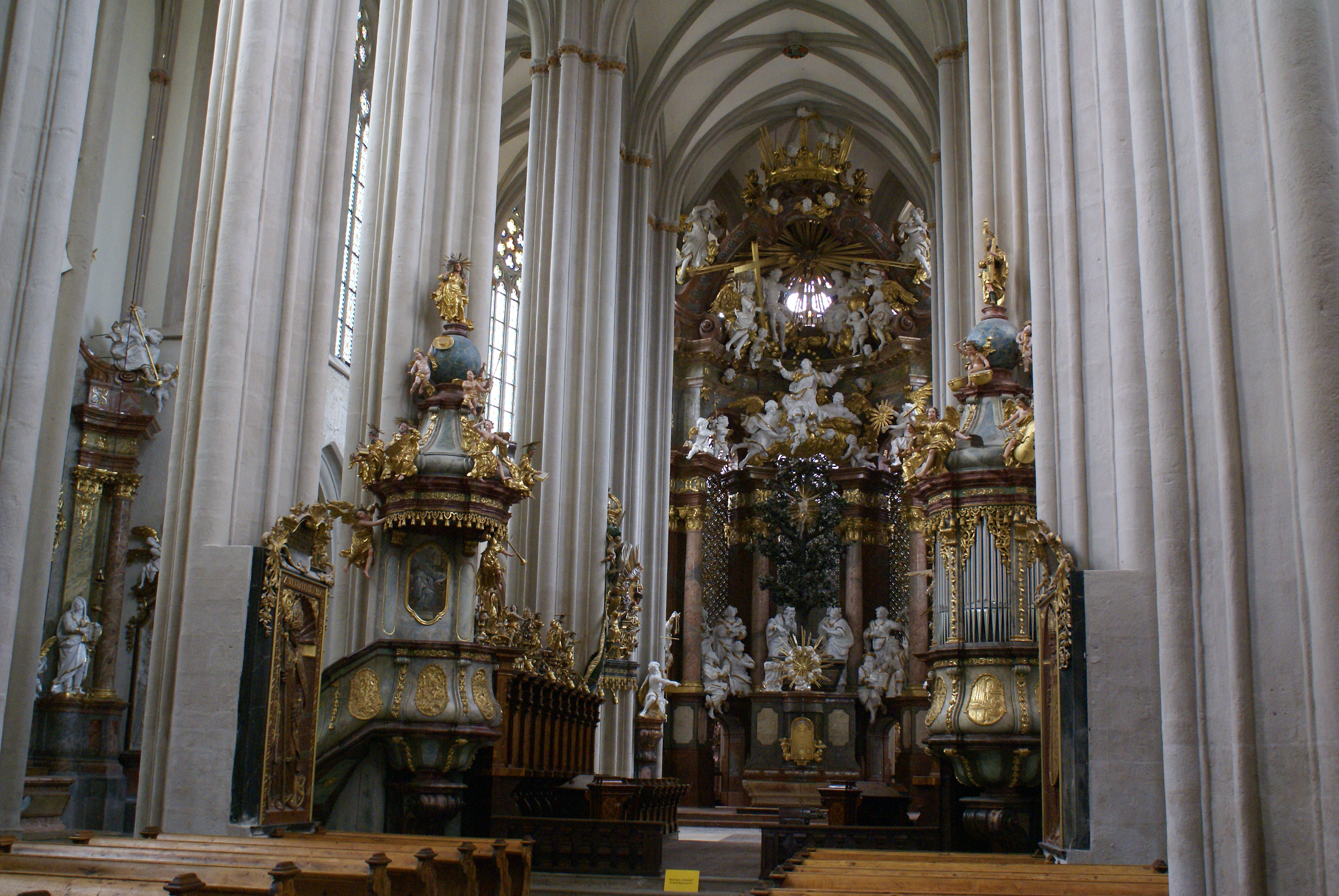 Gesamtanlage Zisterzienserstift Zwettl